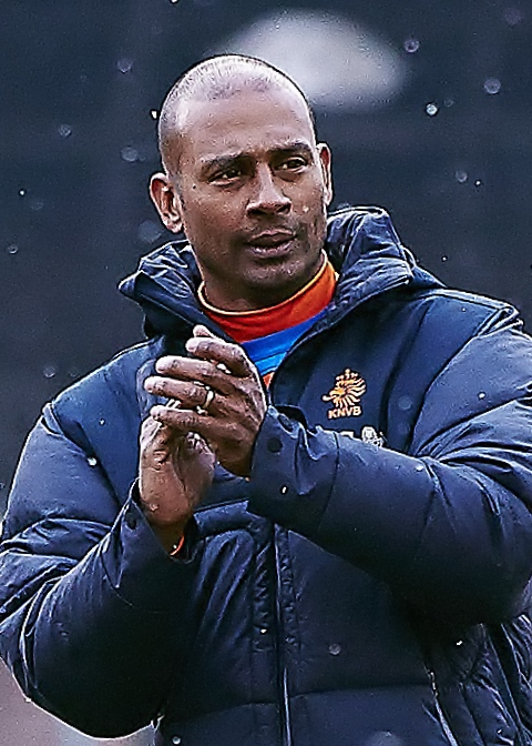 Aron Winter tijdens de ING BallenMeiden Selectiedag in Delft op 29 maart 2013.